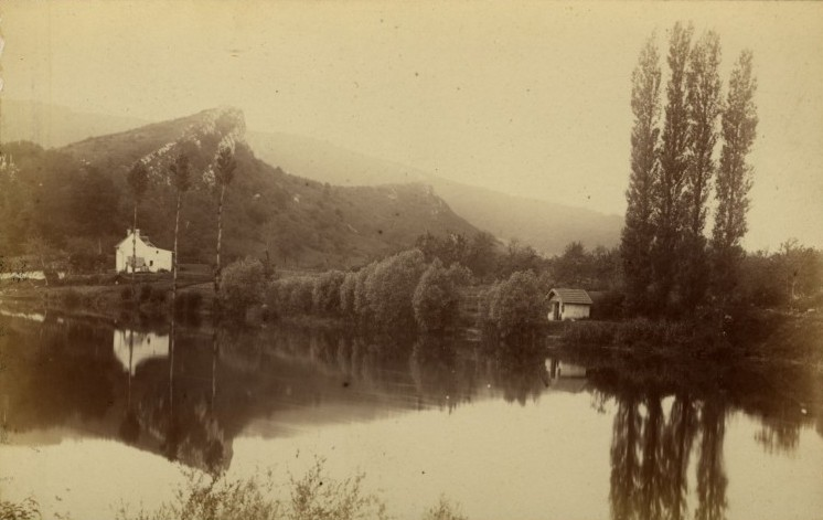 Port Douvot - La Roche d'Or, Besançon